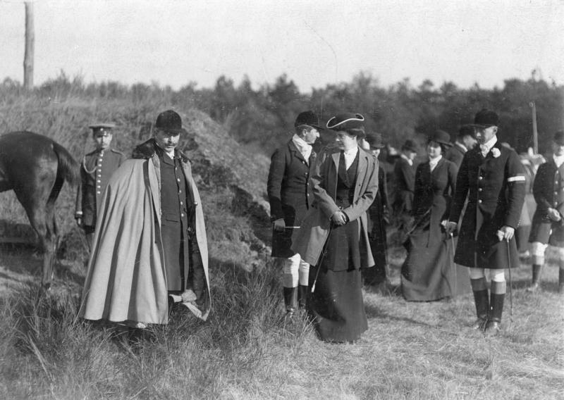 Kaiser Wilhelm II. auf Jagd Scherl Bilderdienst 1908. Kaiserliche Parforcejagd am 19.10.1908, von rechts Kronprinz Wilhelm, Kronprinzessin Cacilie, Kaiser Wilhelm II. [v.l. Kaiser Wilhelm II, Kronprinzessin Cecilie und Kronprinz Wilhelm] Abgebildete Personen: Wilhelm II.: Deutsches Reich, Kaiser, II., Deutschland Preußen, Wilhelm von: 1882-1951, Kronprinz, Chef des Hauses Hohenzollern 1941-1951, Deutschland Preußen, Cecilie von: 1886-1954, verheiratet mit Kronprinz Wilhelm, Tochter Großherzog Friedrich Franz III. von Mecklenburg-Schwerin, Deutschland